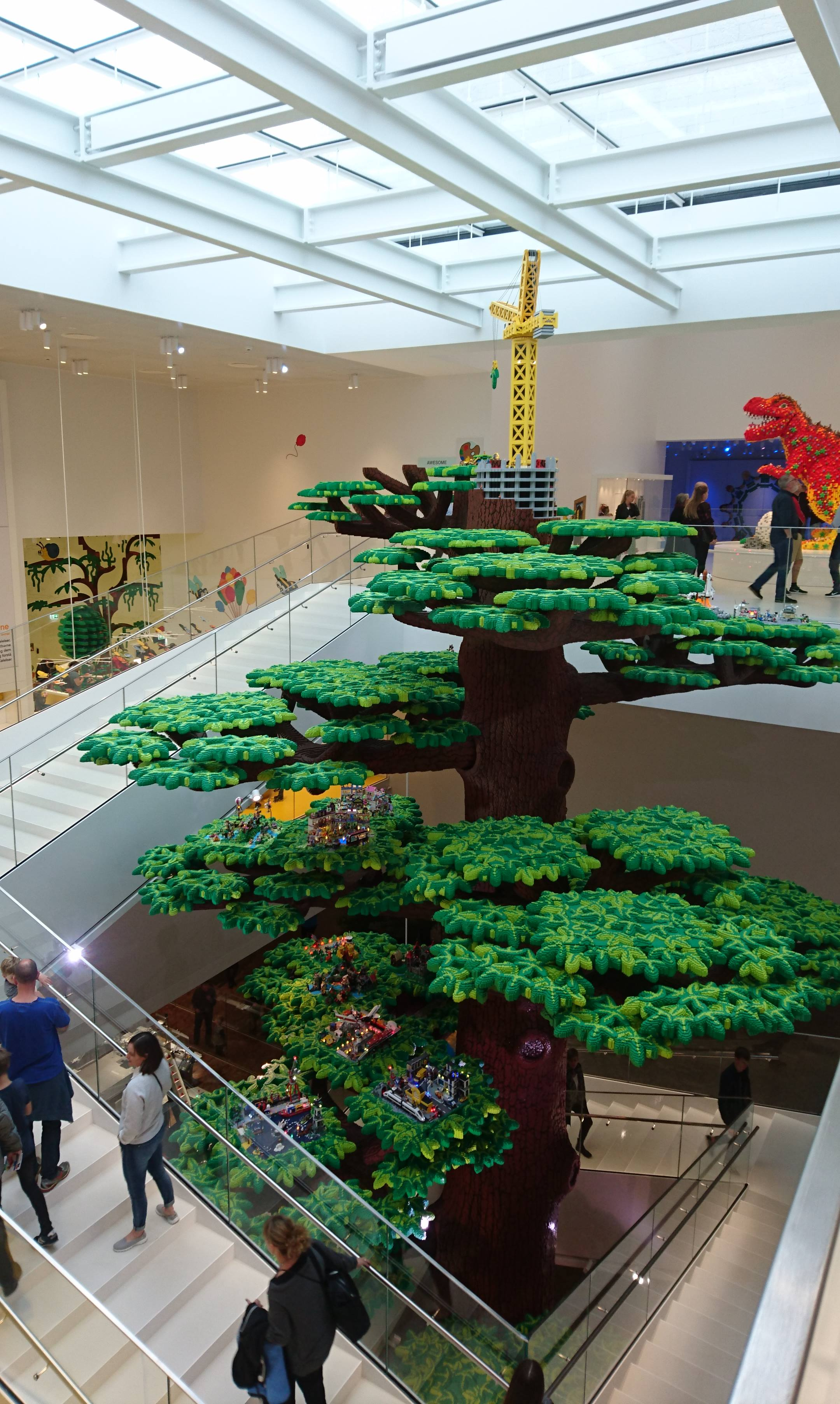 Lego House (Billund) - Tree Of Creativity